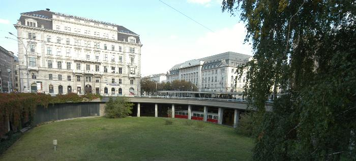 Verkehrsbauwerk "Jonasreindl" an der Wiener Ringstraße bei der Votivkirche